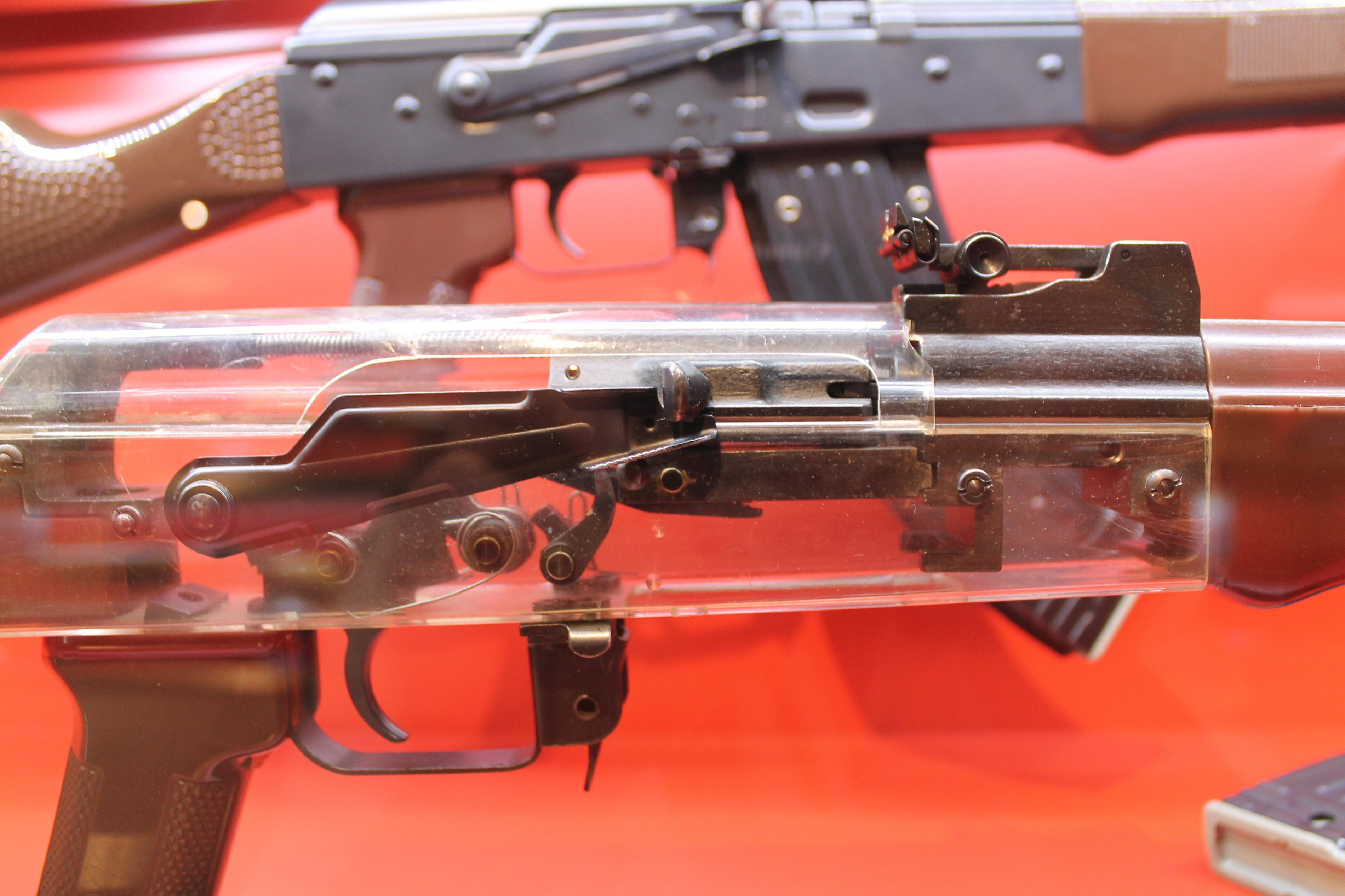 KK-MPi 69 im Waffenmuseum Suhl. Schnittmodell mit Systemkasten aus Plexiglas.